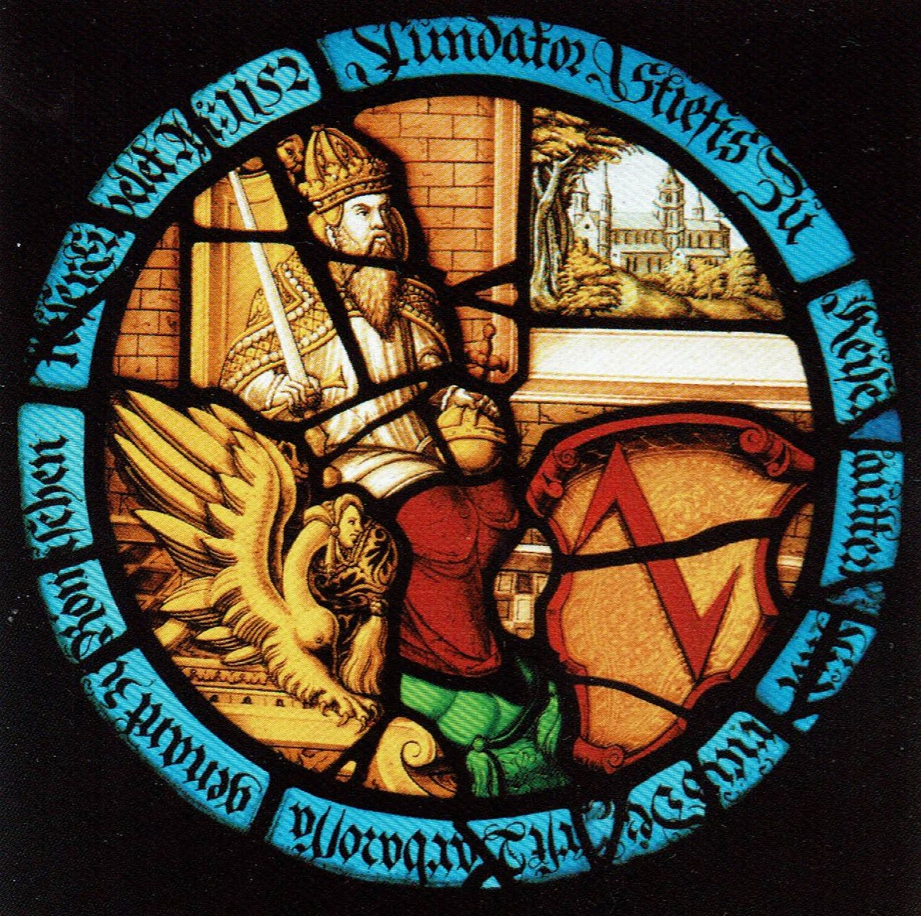 Kaiser Friedrich Barbarossa als Stifter des Stifts Kaiserslautern. Glasmalerei, angeblich aus der Stiftskirche Kaiserslautern, 1826 aus Speyer in die Alte Pinakothek München gelangt, seit 1876 im Bayerischen Nationalmuseum